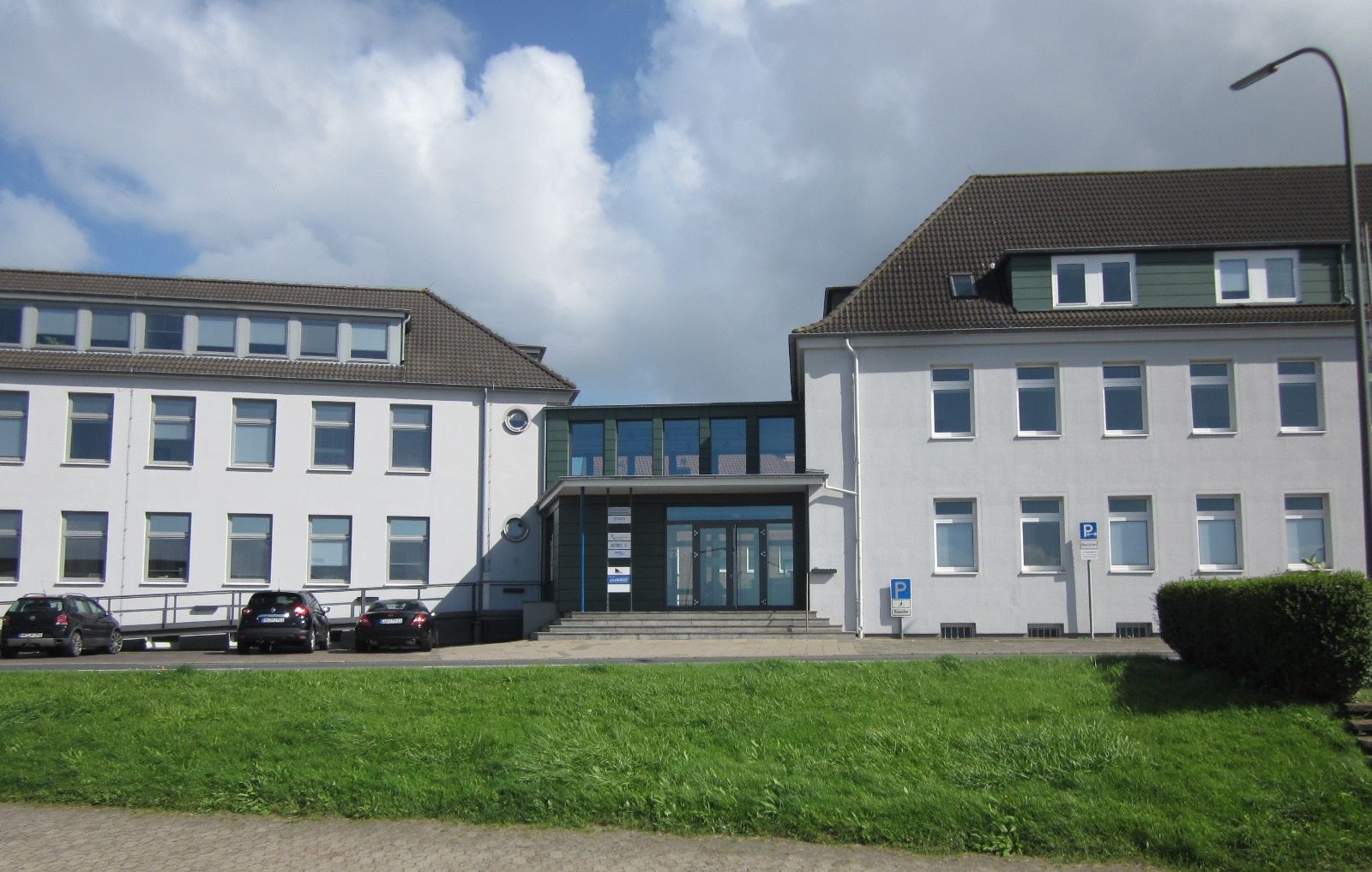 Eingang zum ehemaligen Doppelgebäude des Hansestadt Bremischen Amtes an der Bussestraße in Geestemünde.